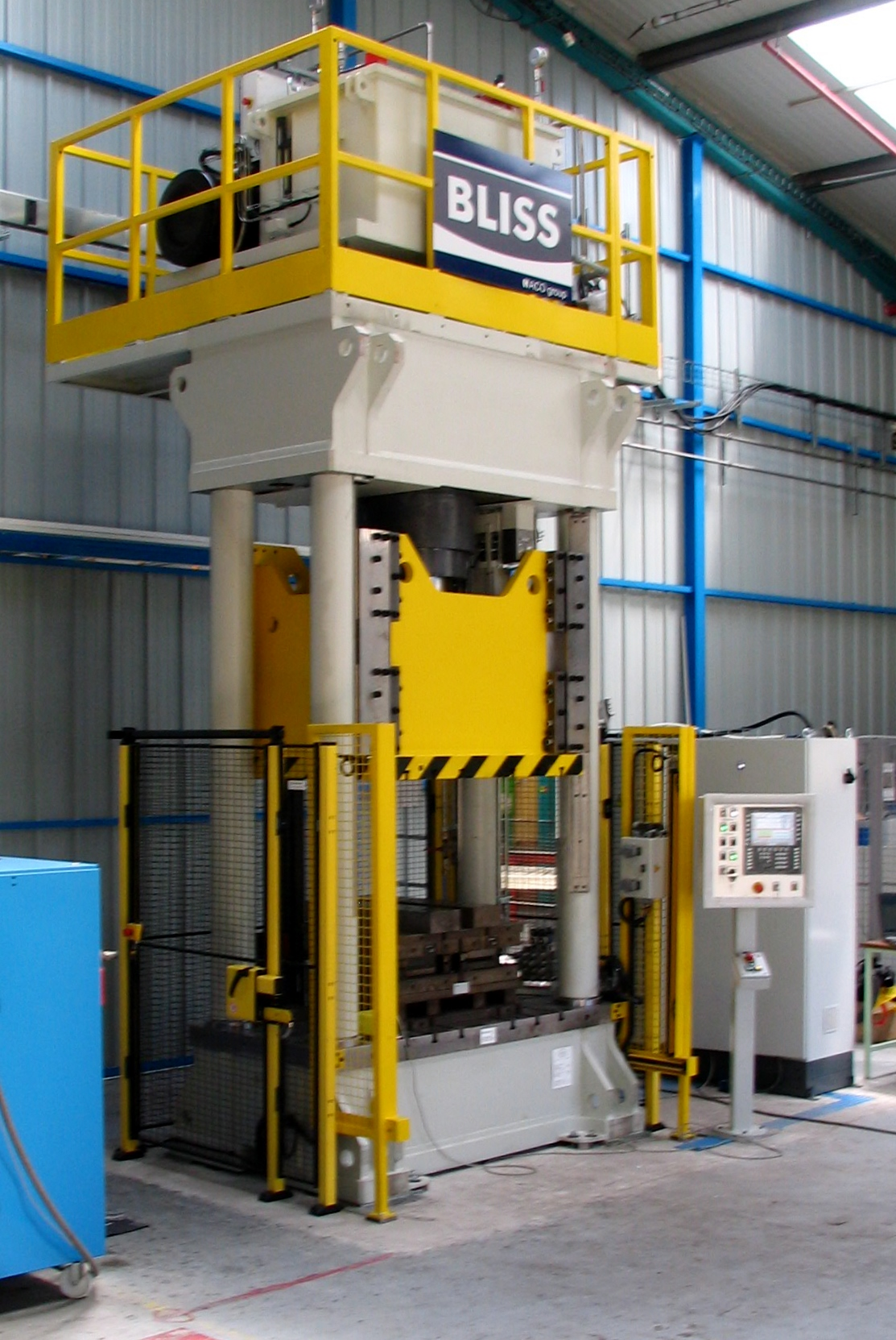 Een BLISS pers PHSC400